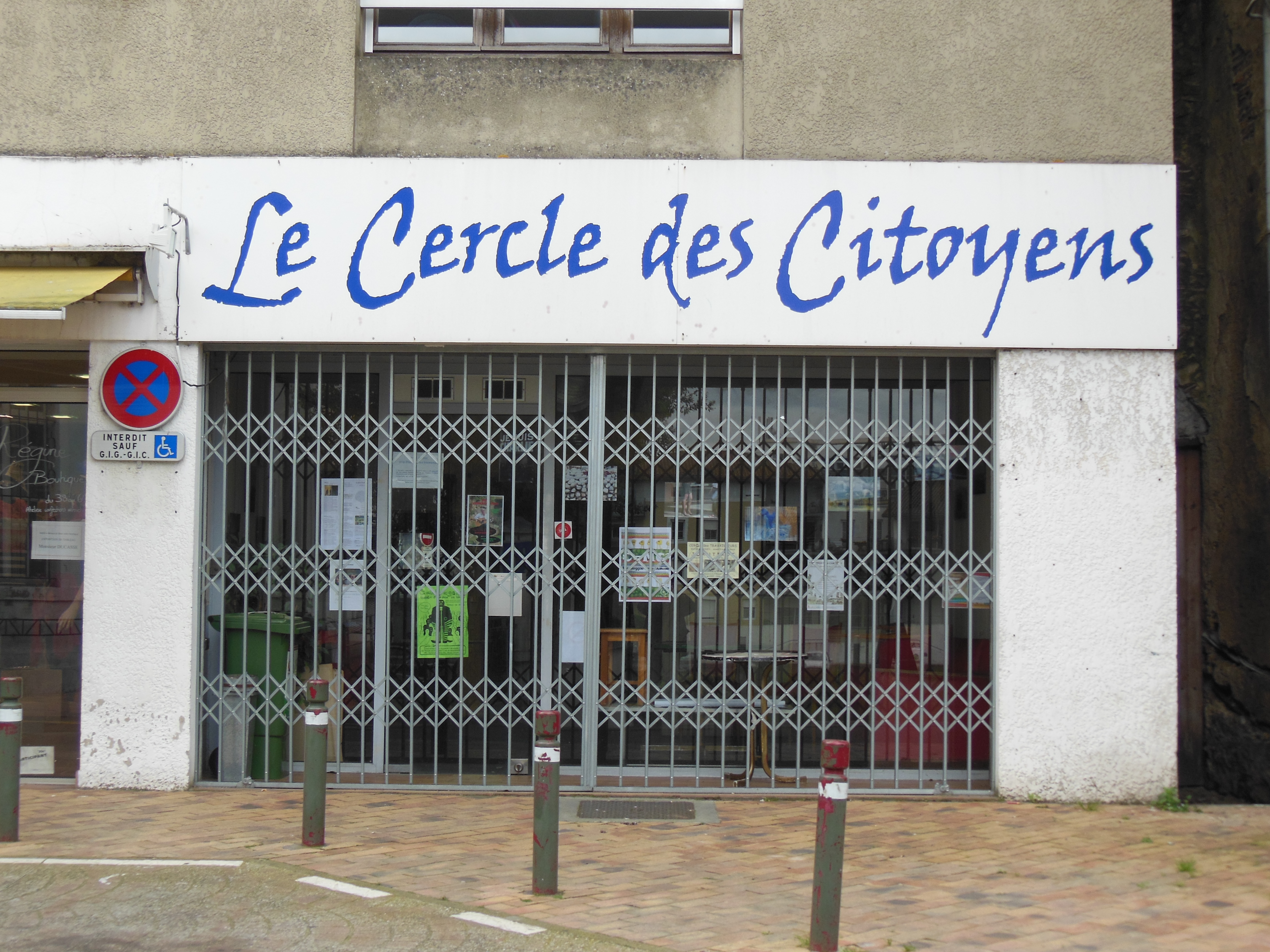 Cercle des Citoyens (Cercle de Gascogne) à Mont-de-Marsan (Landes, France)